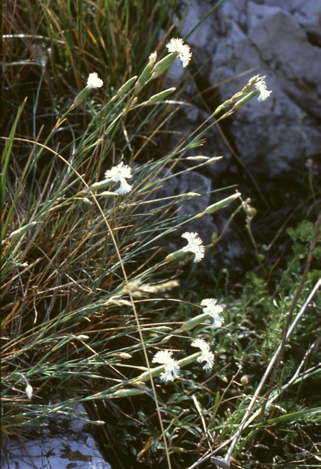 Hainburger Federnelke (Dianthus plumarius subsp. lumnitzeri), Nelkengewächse (Caryophyllaceae) - Österreich/Austria/Autriche: Niederösterreich, Hundsheimer Berg S Hainburg